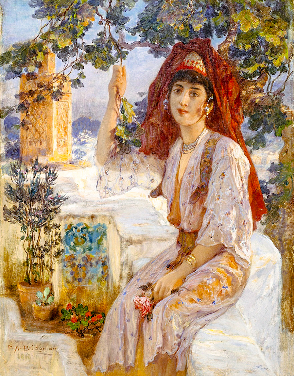 Frederick Arthur Bridgman : Jeune femme de Tlemcen, Algérie (huile sur toile, 67 x 42 cm)